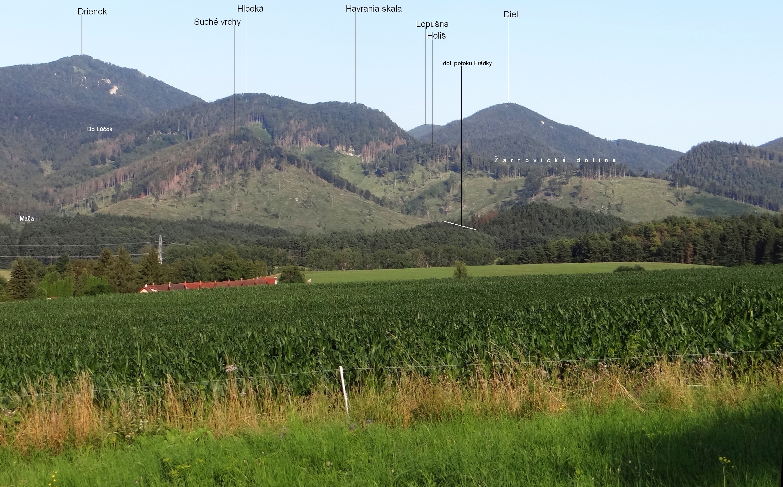 Drienok i inne szczyty Wielkiej Fatry. Widok ze stacji paliw w Turcianske Teplice